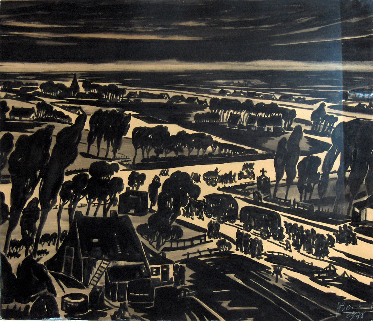 Panoramisch gezicht met volksverhuizers (1938), a wash ink drawing on paper by Gustaaf Sorel